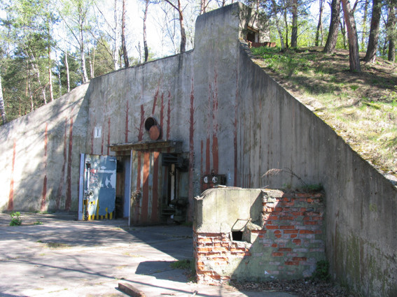 Lotnisko Szprotawa-Wiechlice - bunkier atomowy